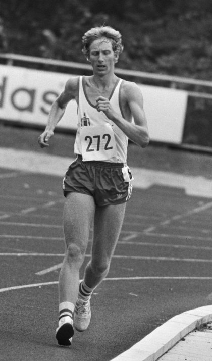 Nederlandse kampioenschappen atletiek in Amsterdam; Ned. kampioen 20 km snelwandelen Jan Cortenbach.